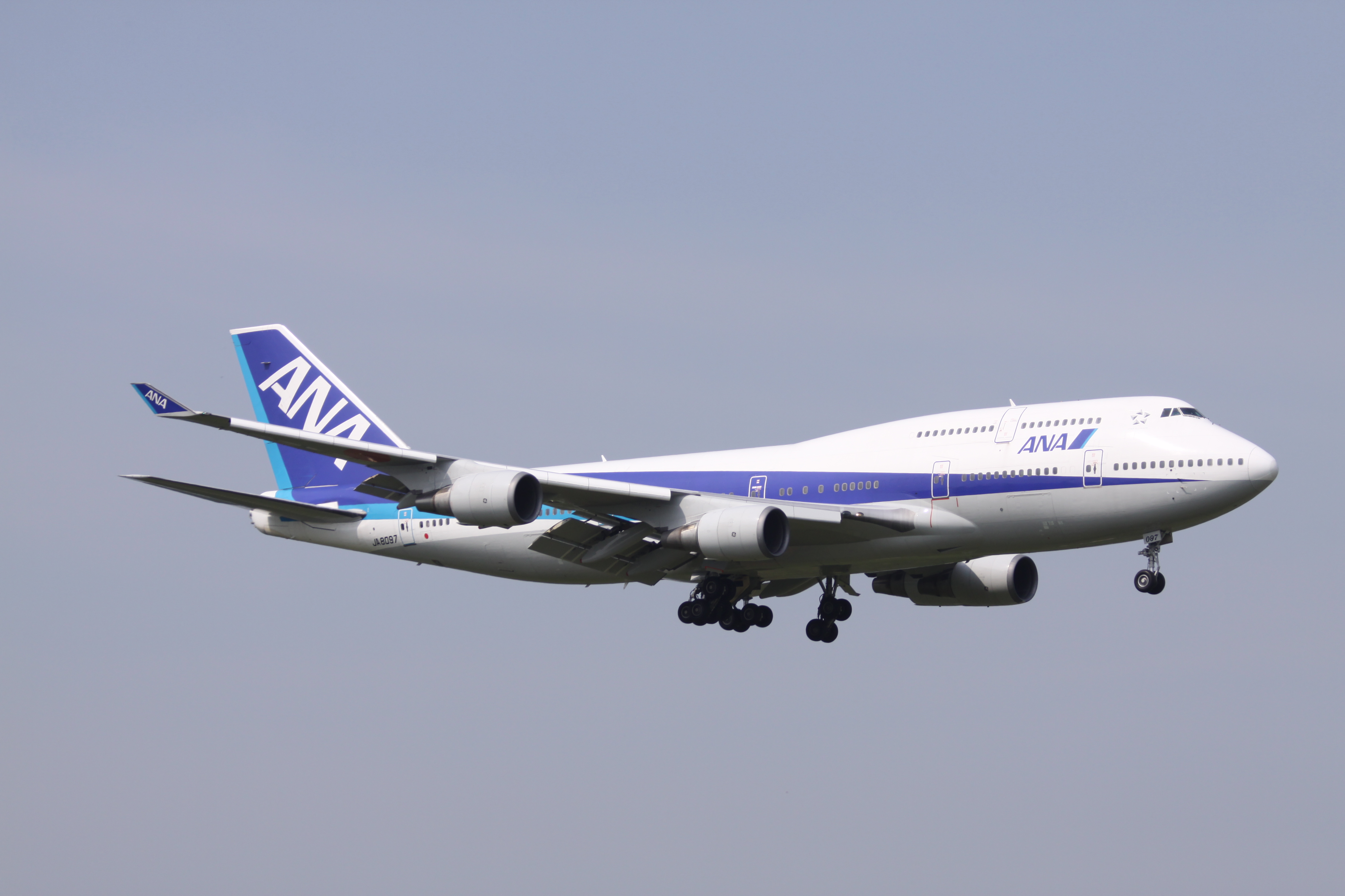 ANA B747-400(JA8097)